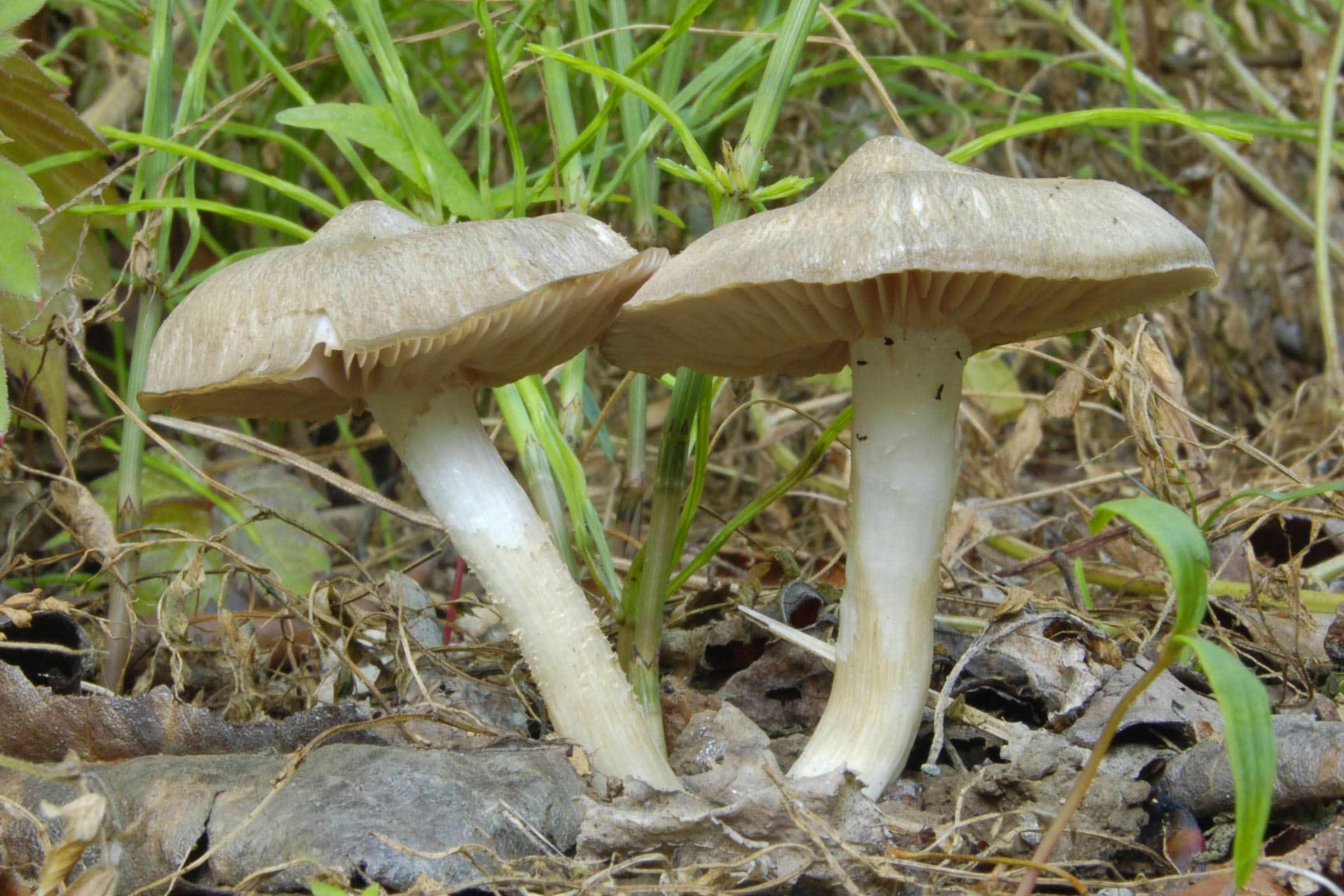 Entoloma sp., under plum tree in spring. Entoloma sp.(広義の「ハルシメジ」。)梅の樹下に発生したもの。